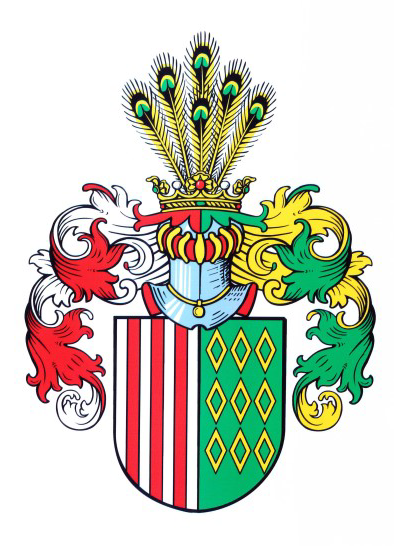 Stammwappen der Familie Gundling, abstammend von Georg Gundling, der 1531 das Bürgerrecht zu Nürnberg erhielt. Blasonierung: Gespalten Silber und Grün, vorne drei Pfähle Rot, hinten neun durchbrochene Rauten Gold 3:3:3; Decken vorne Rot Silber, hinten Grün Gold; Helmkrone, ein Pfauenfedernstoß von 6 Federn.